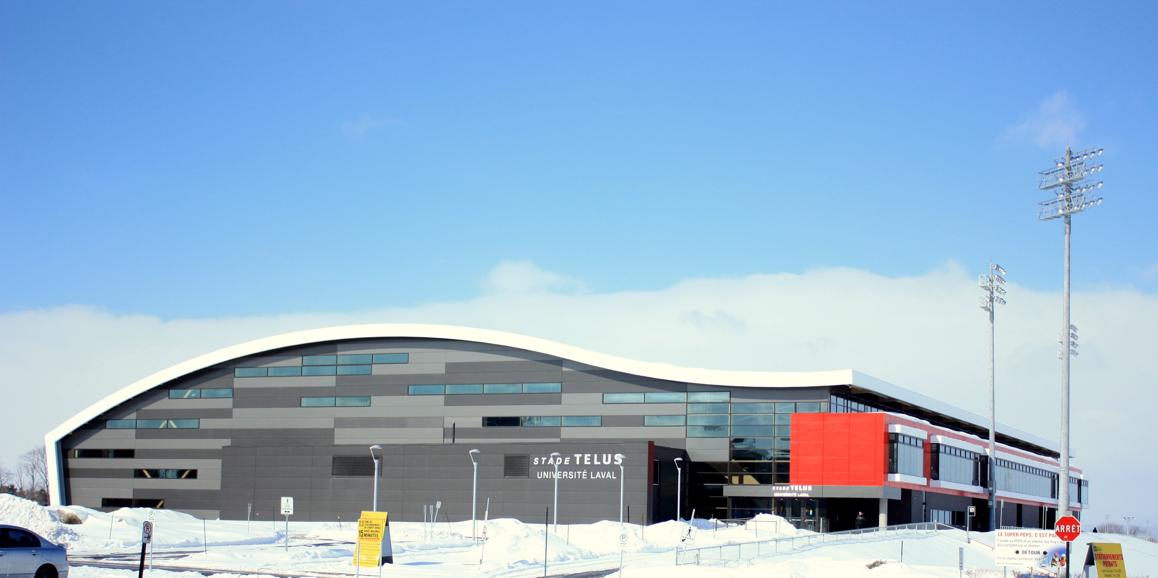 Stade Telus de l'Université Laval.